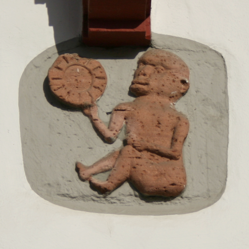 Sandsteinrelief vom Altstädter Rathaus in Hanau. „Affe mit Spiegel“, beliebtes mittelalterliches und frühneuzeitliches Sinnbild für blinde Eigenliebe.